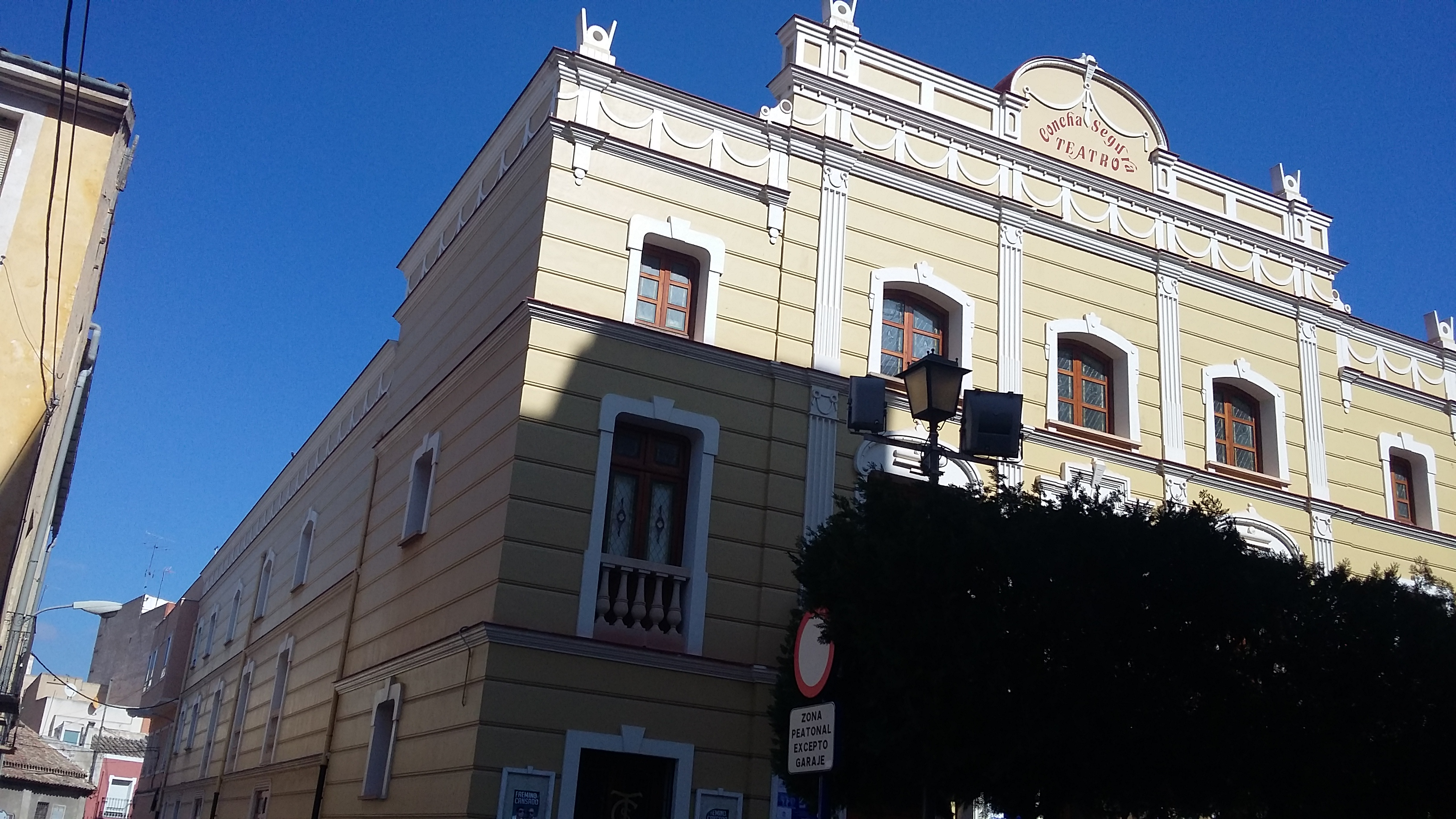 Lugar Yecla Tipo Público Fecha de apertura 1886